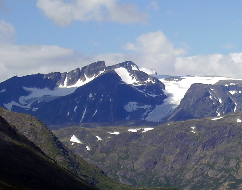 Surtningssue sett fra veien over Valdresflya. Foto: Tore Røraas / Marianne Gjørv.